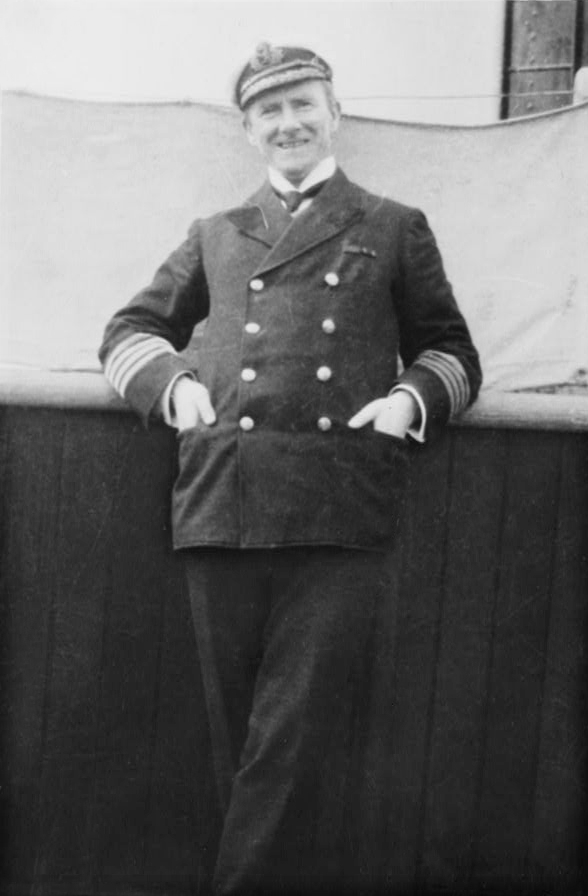 Il capitano Arthur Rostron.